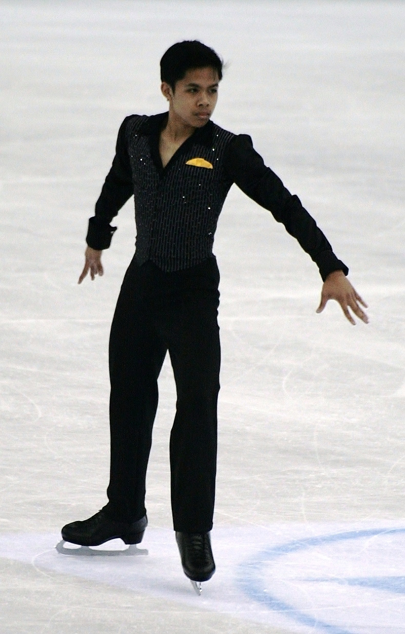 Кристофер Калуза (Филлипины) на чемпионате мира по фигурному катанию 2012, короткая программа.